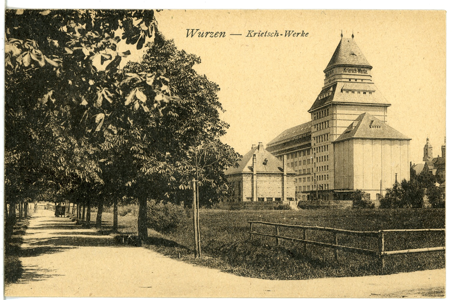 Wurzen; Krietsch-Werke This postcard is from publisher Brück & Sohn in Meißen ( postcard has a unique number 21527 and is available in a higher resolution at the publisher. This images was uploaded in a cooperation project between Wikipedians and the publisher.